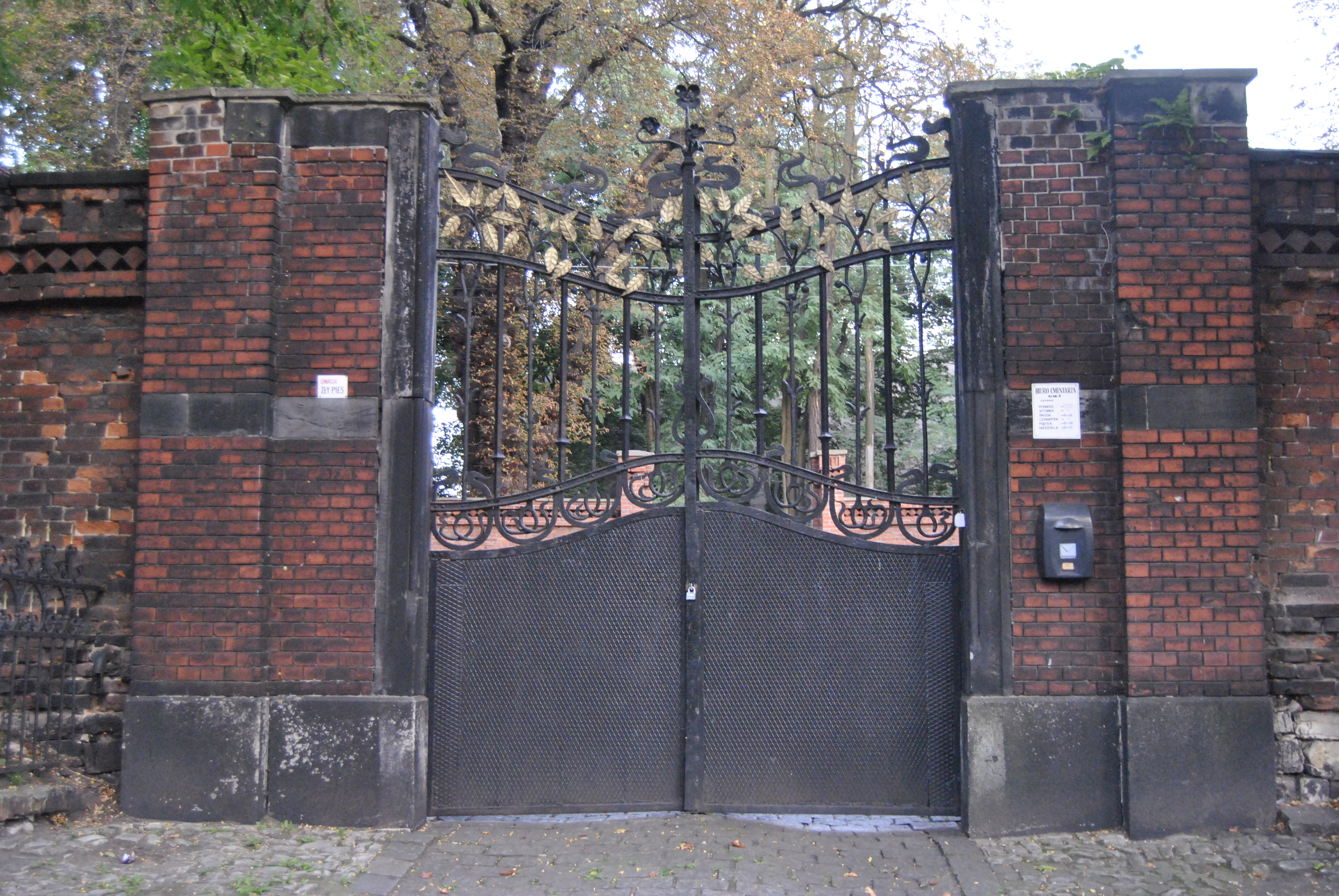 Bytom, ogrodzenie z bramami, 2 poł. XIX